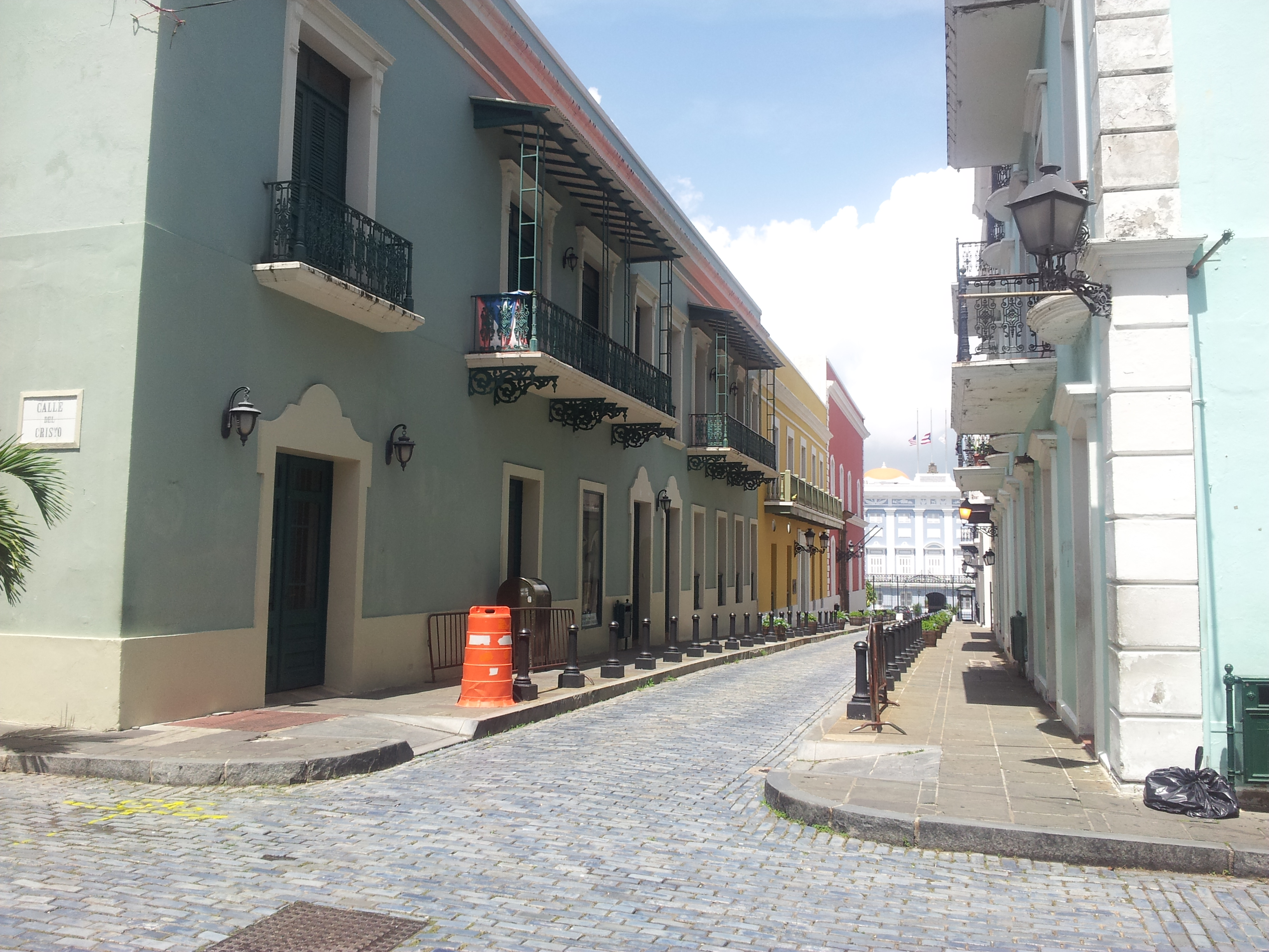 Calle de La Fortaleza, Viejo San Juan, Puerto Rico.